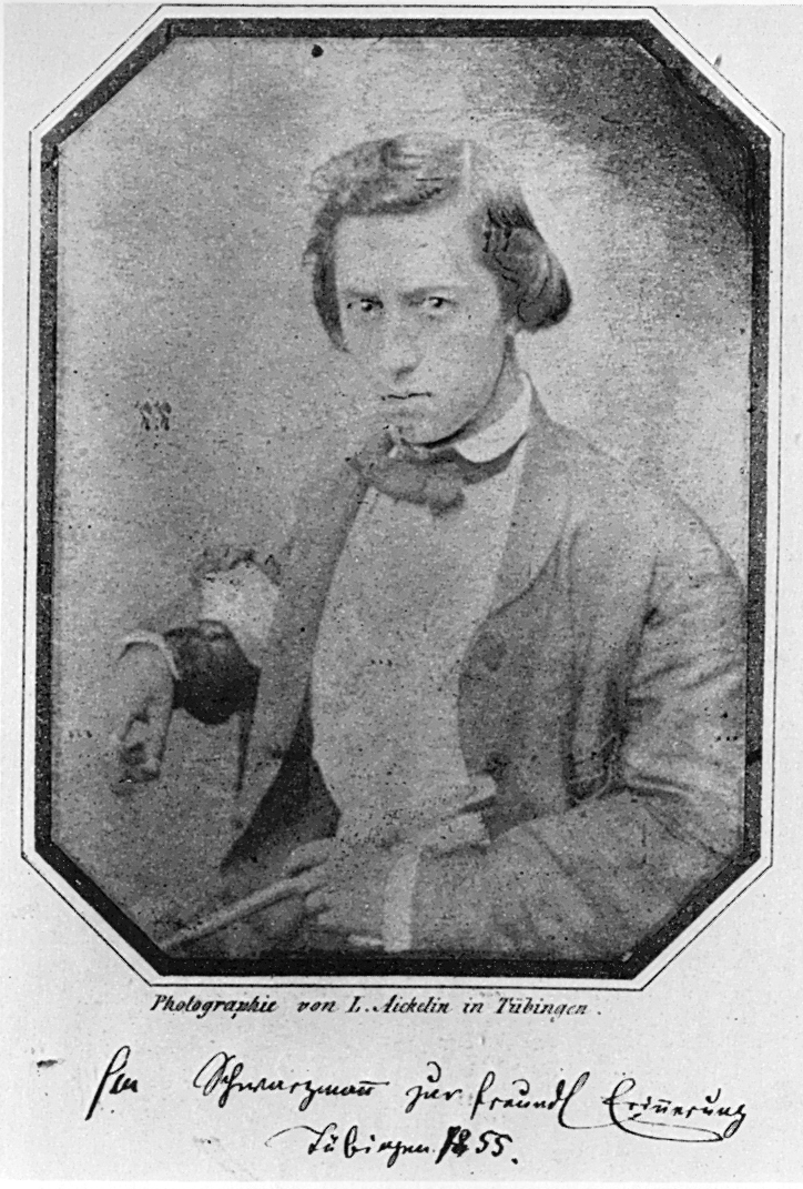 Porträt eines unbekannten Mitglieds der Burschenschaft Germania (Salzpapierabzug 120 × 95 mm) mit der Widmung: „Für Schwarzmann zur freundl. Erinnerung / Tübingen 1855.“